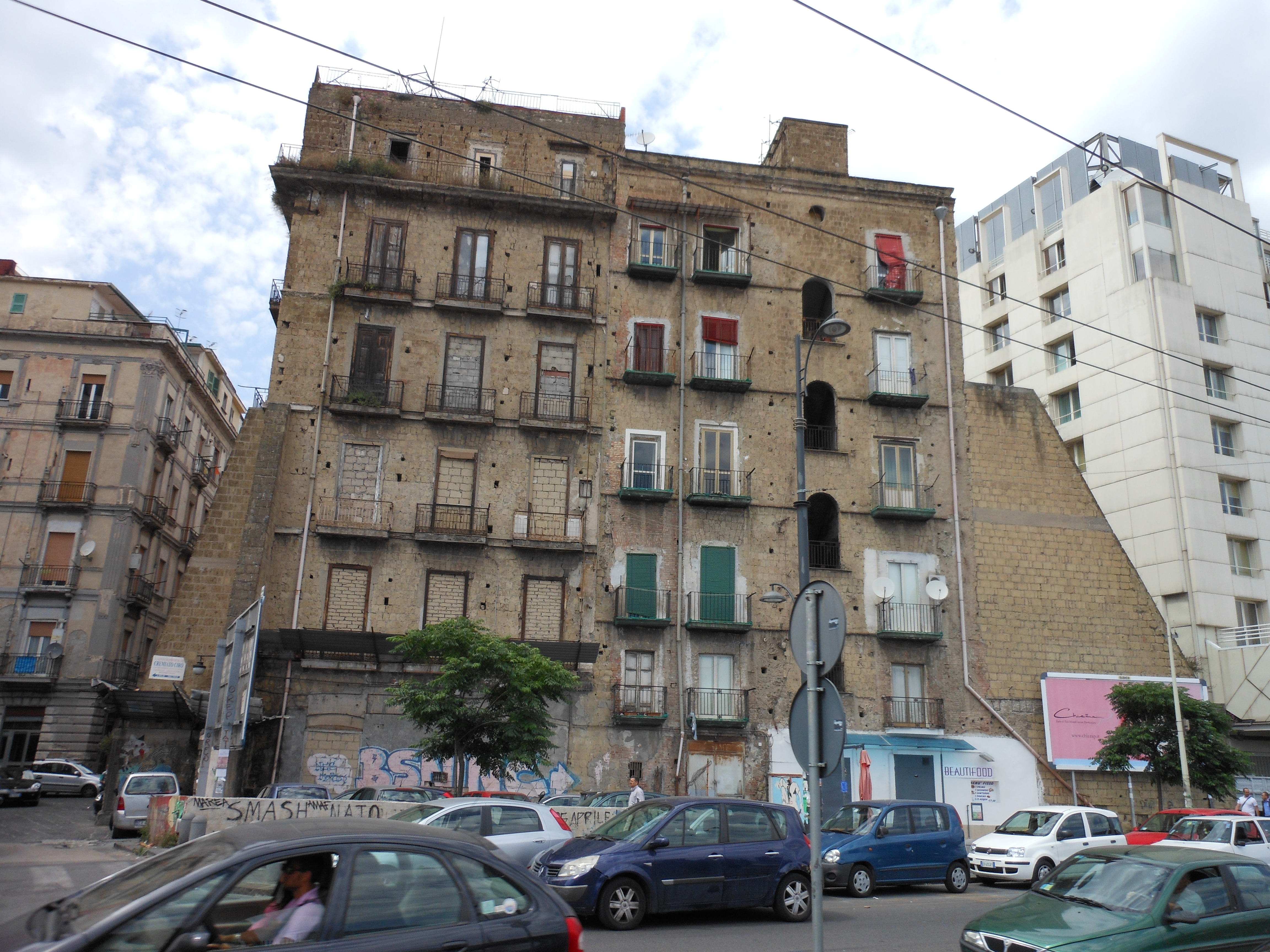 Palazzo pre-risanamento superstite in via Marina, presso l'incrocio con via Capocci, a Napoli